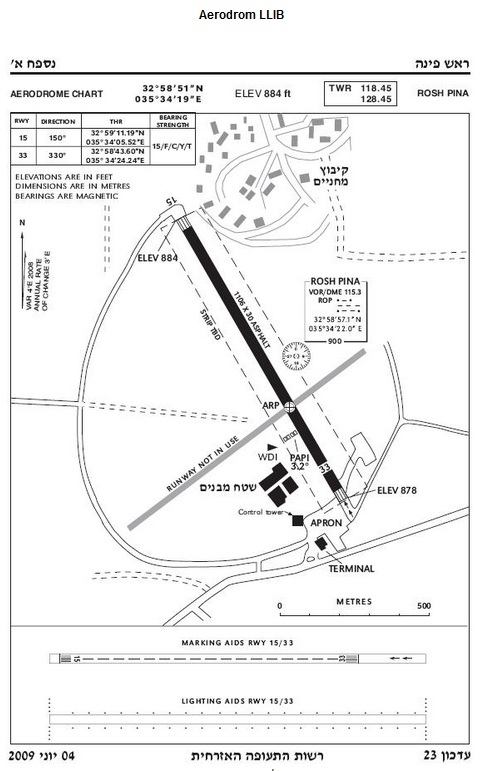 תרשים של שדה התעופה של ראש פינה מתאריך 2009